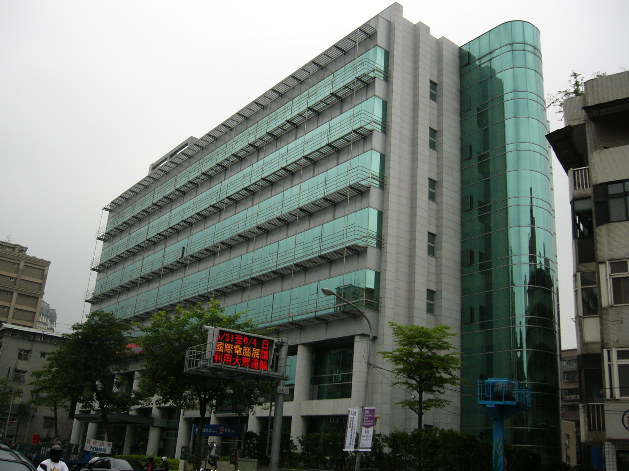 位於台灣台北市文山區木柵路一段的世新大學管理學院大樓Bân-lâm-gú: Tī Tâi-uân Tâi-pak-tshī Bûn-san-khu Ba̍k-sa-lōo it tuānn ê Sè-sin Tāi-ha̍k Kuán-lí Ha̍k-īnn tuā-lâu